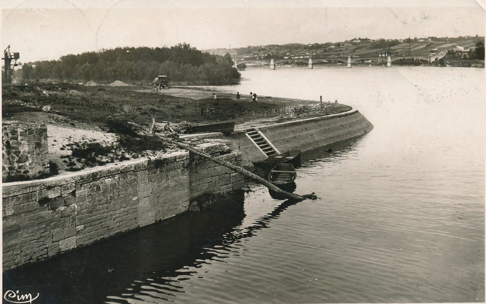 Quai de la navigation, Givors. Archives municipales, cote 5Fi 2191 2